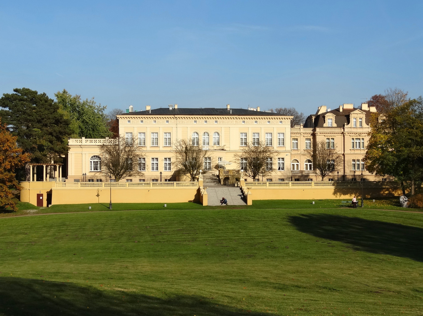 Ostromecko k. Bydgoszczy, pałac, tzw. Nowy, zbud. 1835-1848, 1891